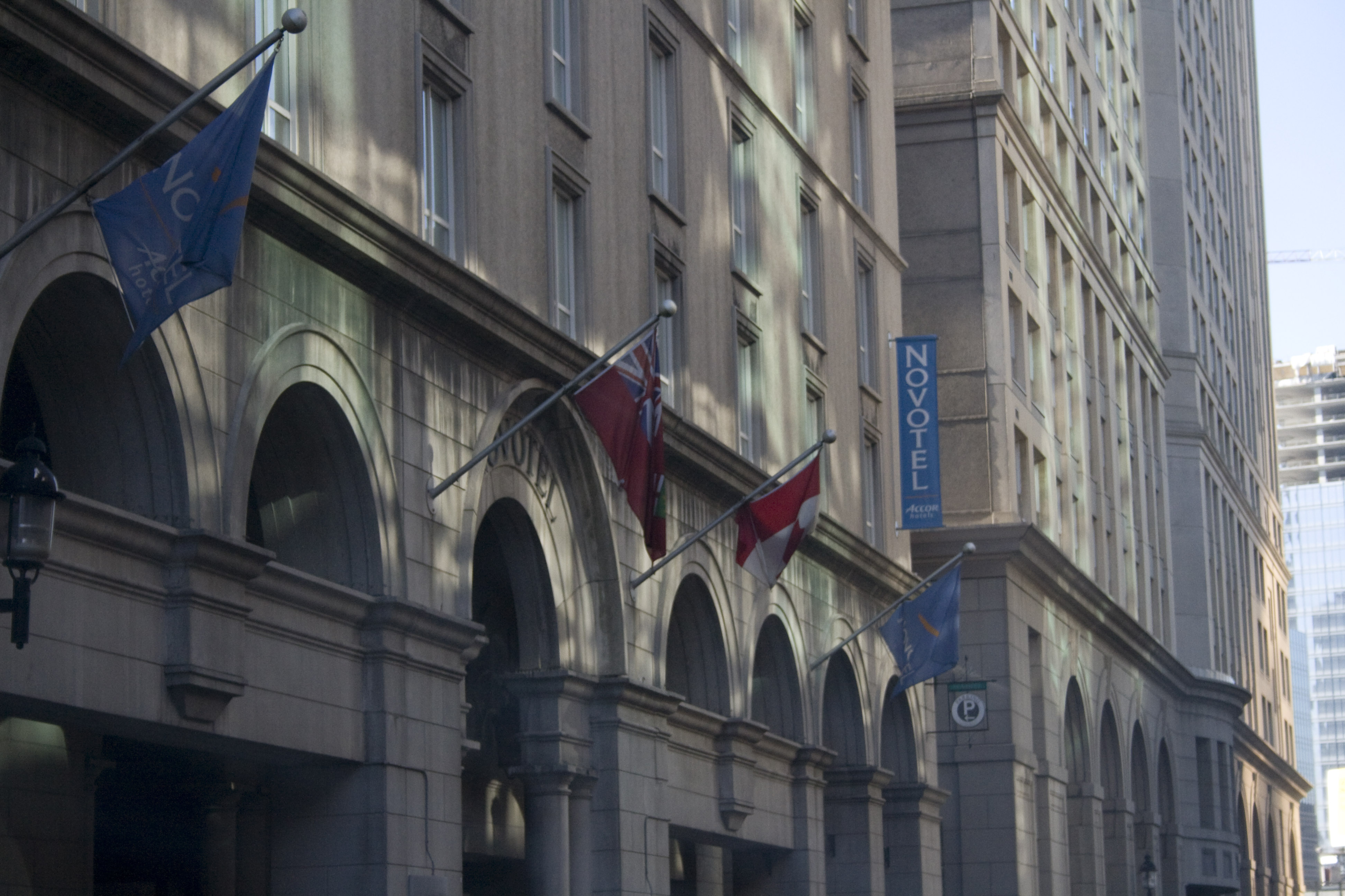 Novotel hotel on The Esplanade, Toronto, Canada.